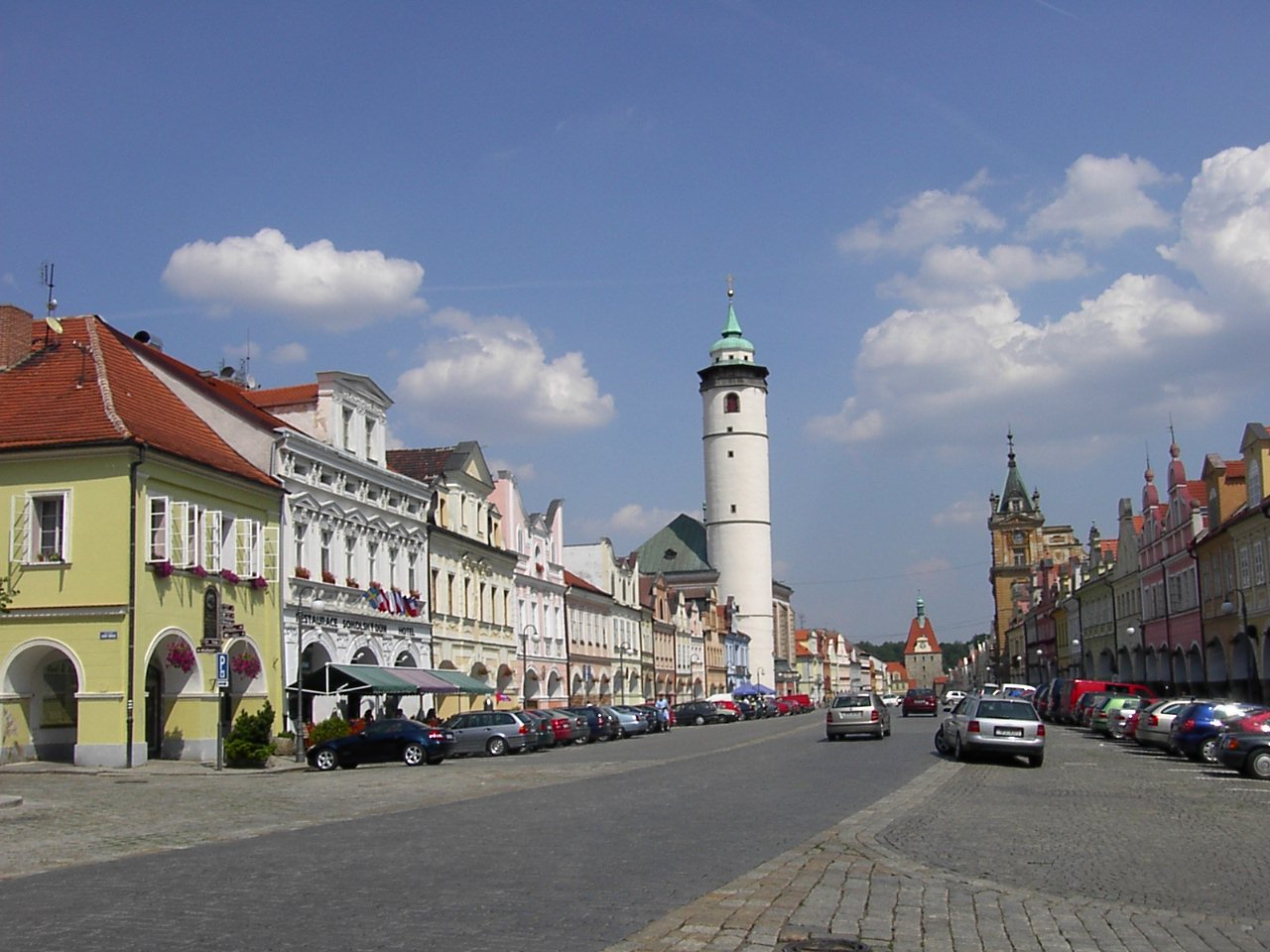 Náměstí Míru v Domažlicích s charakteristickou kruhovou 56 m vysokou věží.